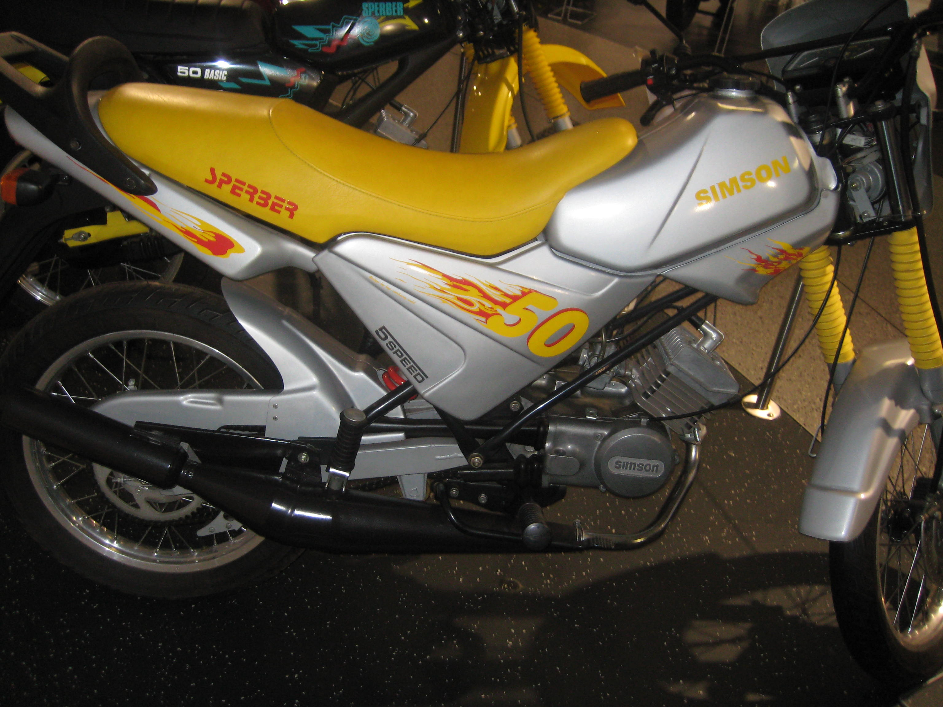 Zdjęcie przedstawiające motorower Simson MS50 (Sperber 50) będący eksponatem w Fahrzeugmuseum Suhl.